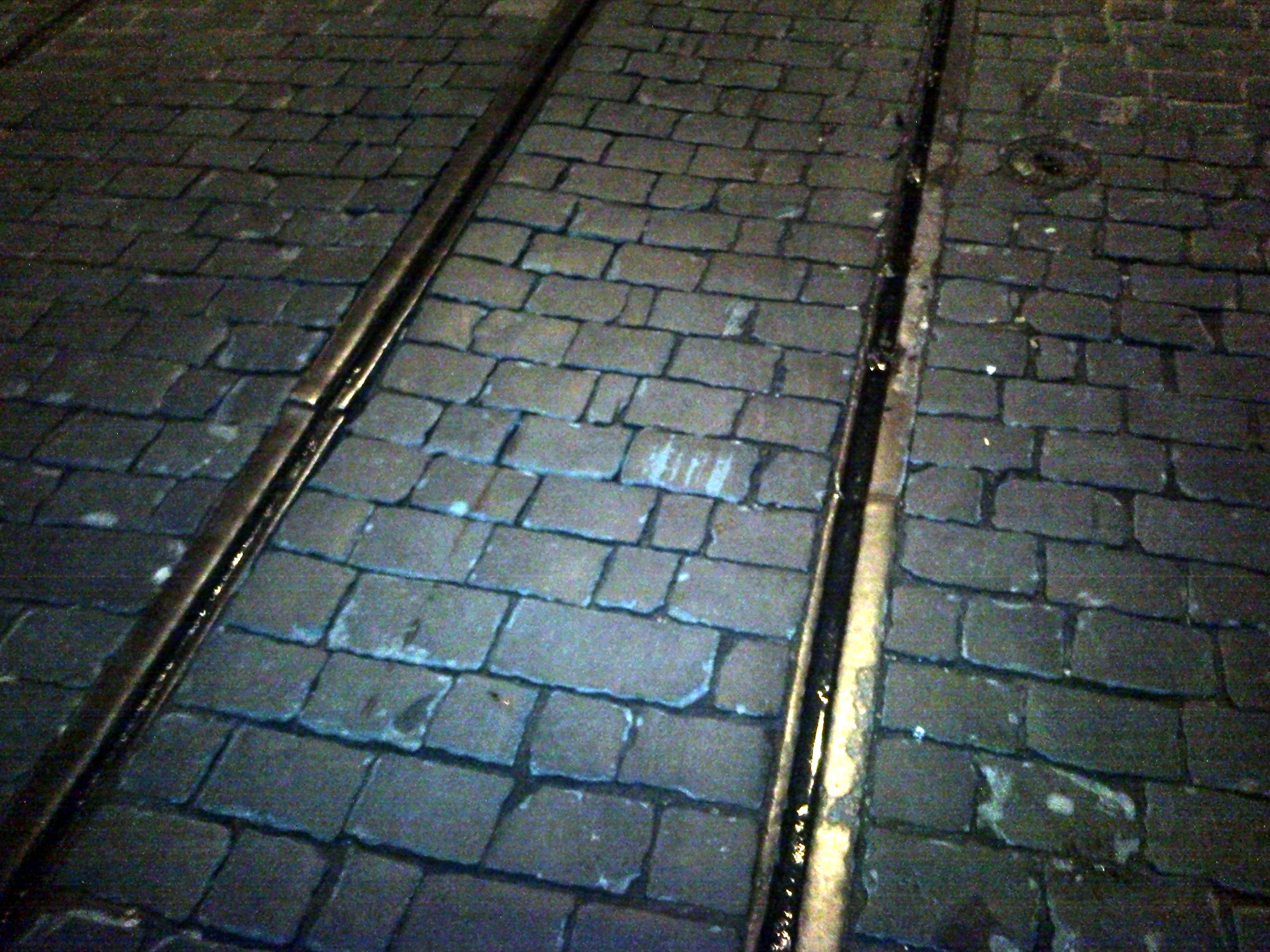 Tory dawnego tramwaju wąskotorowego na Starym Mieście w ulicy Szewskiej, rok 2015.